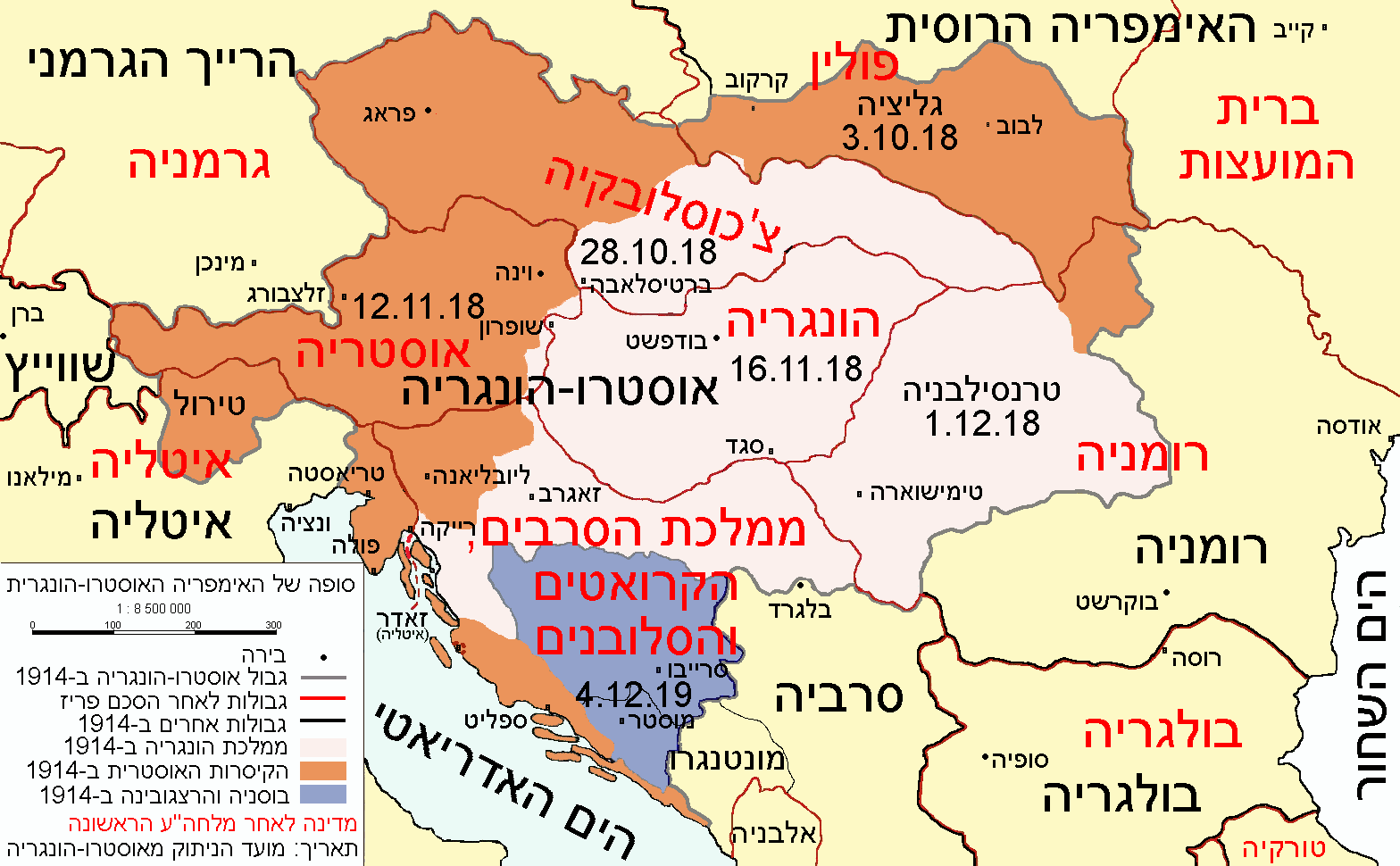 סופה של אוסטרו-נהונגריה